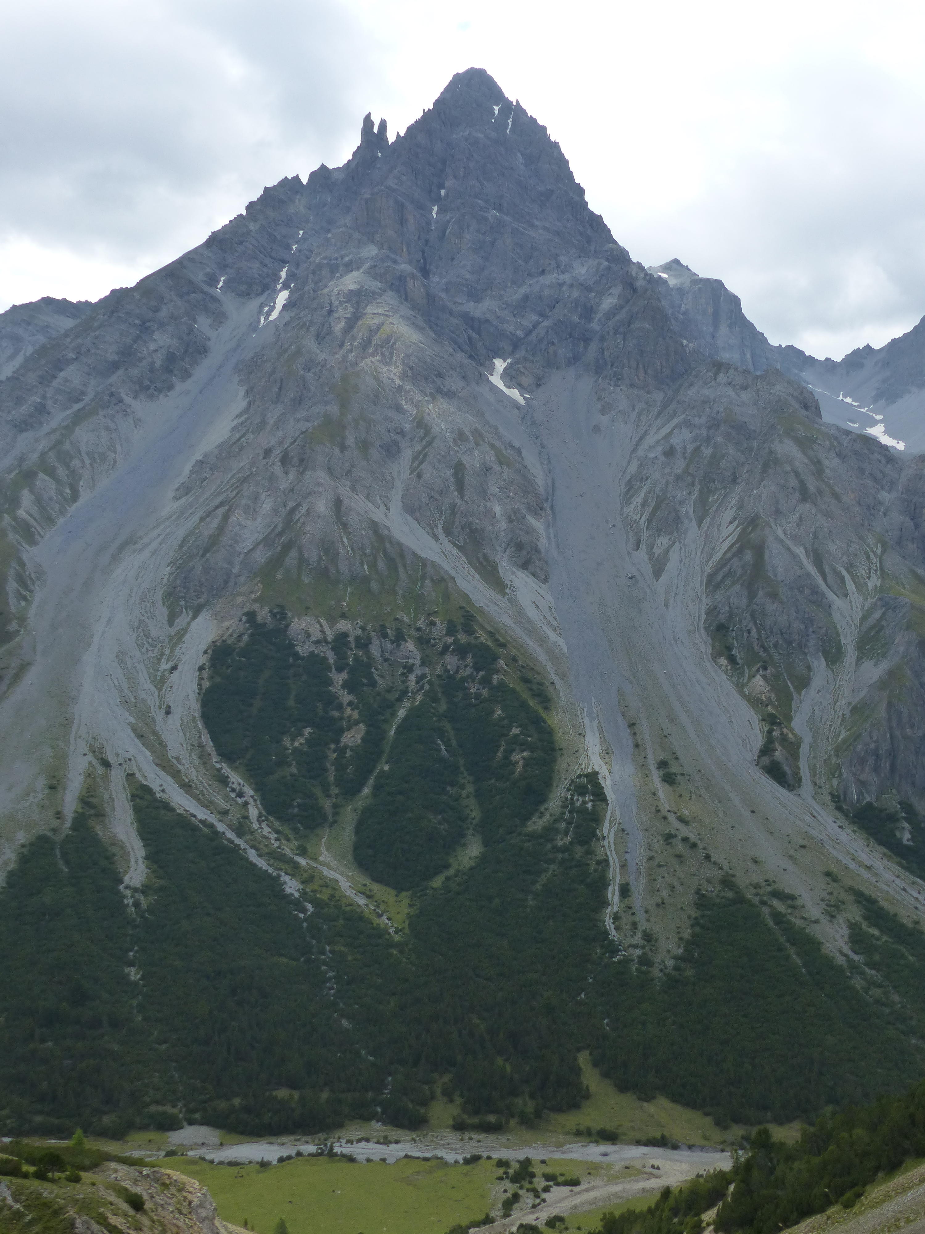 Piz Plavna Dadaint über dem Val Plavna (Blick vom Sur il Foss)